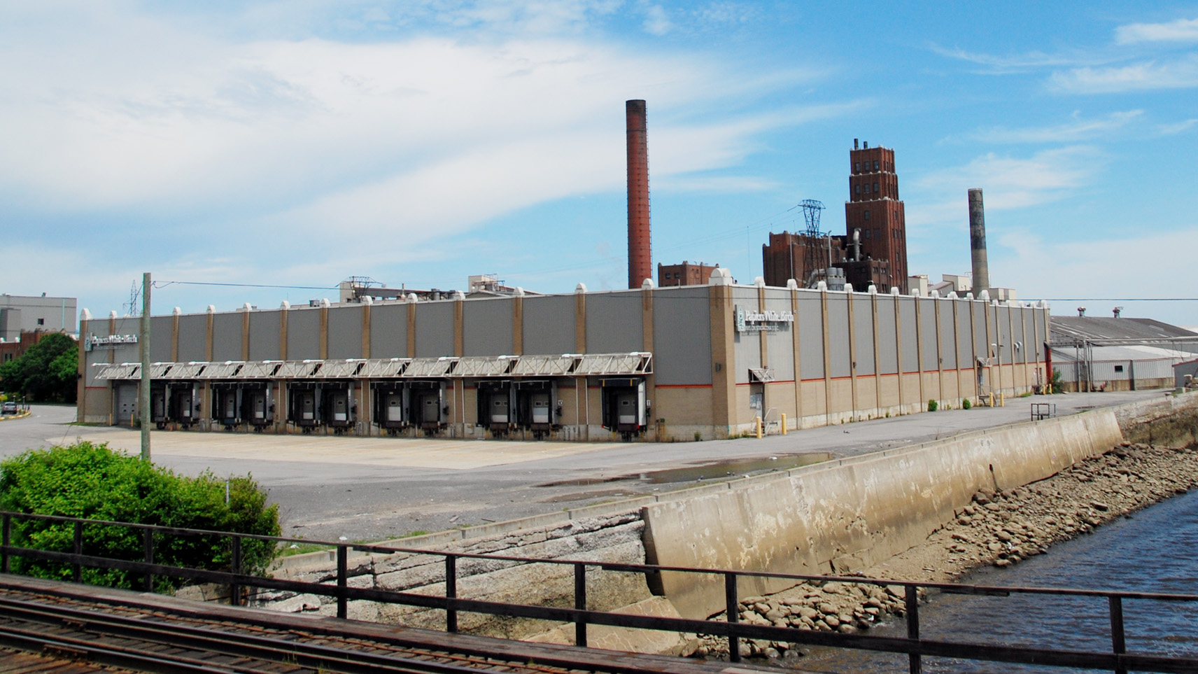 L'usine de Papiers White Birch dans le quartier Limoilou de Québec pendant sa fermeture temporaire en 2012